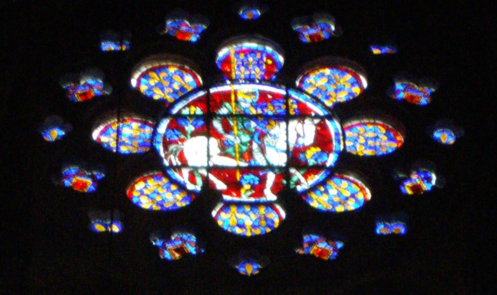 Vitráž ze Chartres - Ludvík VIII.